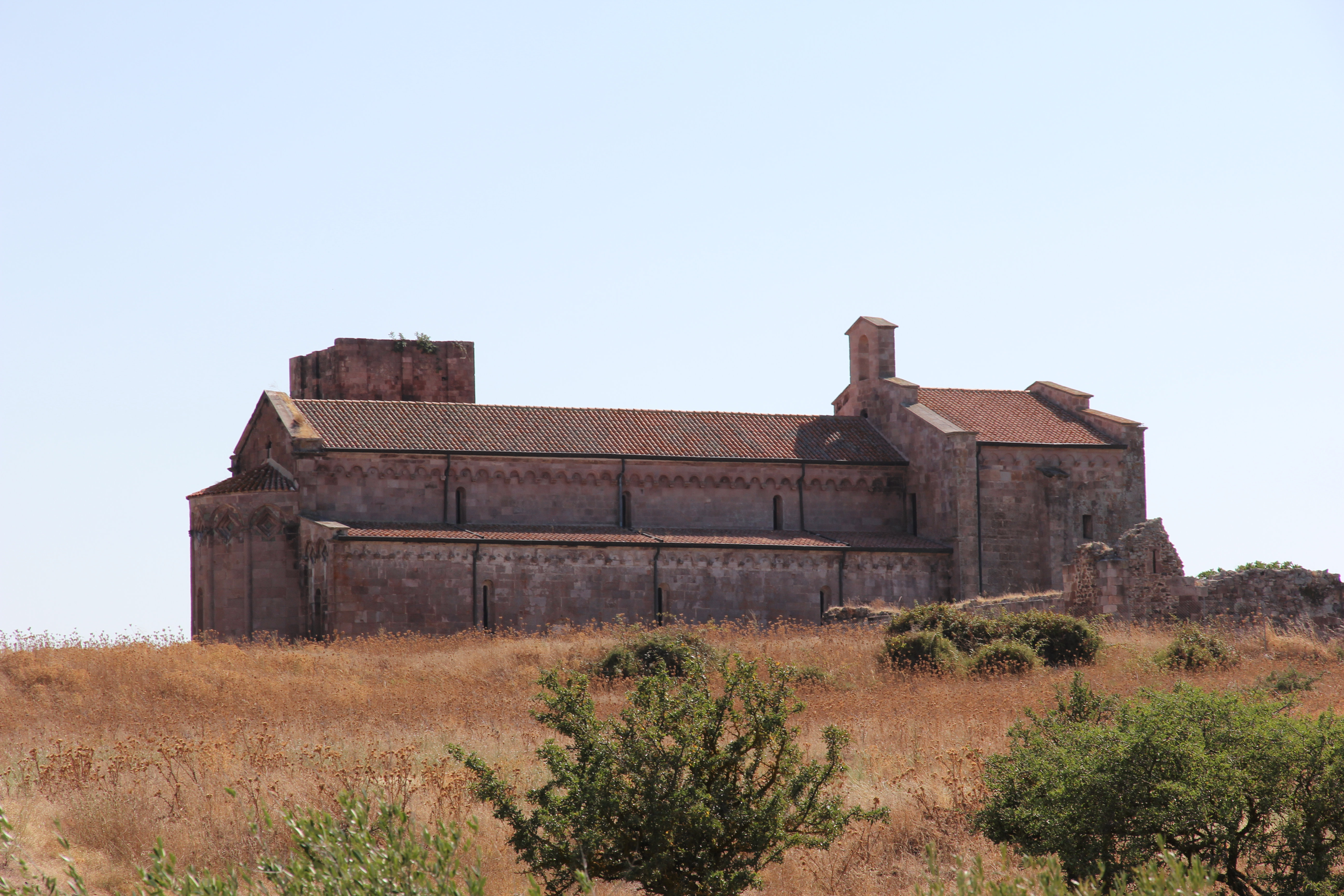 Ozieri - Basilica di Sant'Antioco di Bisarcio